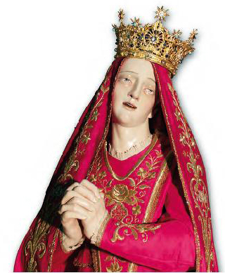 Statua Vergine Addolorata di Gavirate - ante 1733